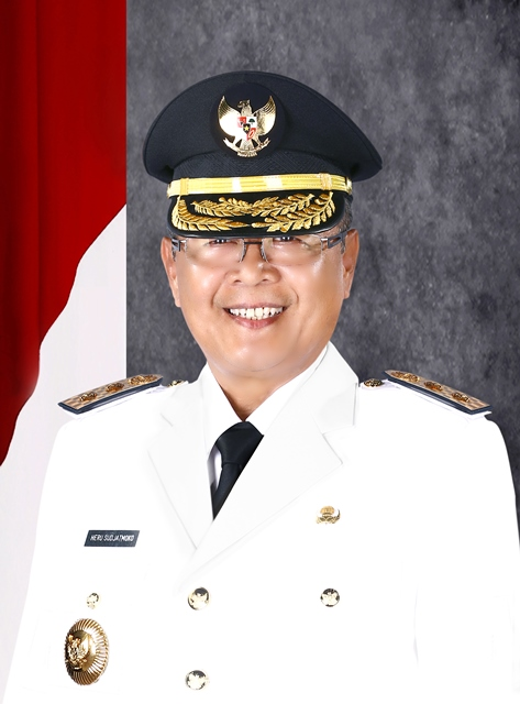 Heru Sudjatmoko, Wakil Gubernur Jawa Tengah periode 2013-2018